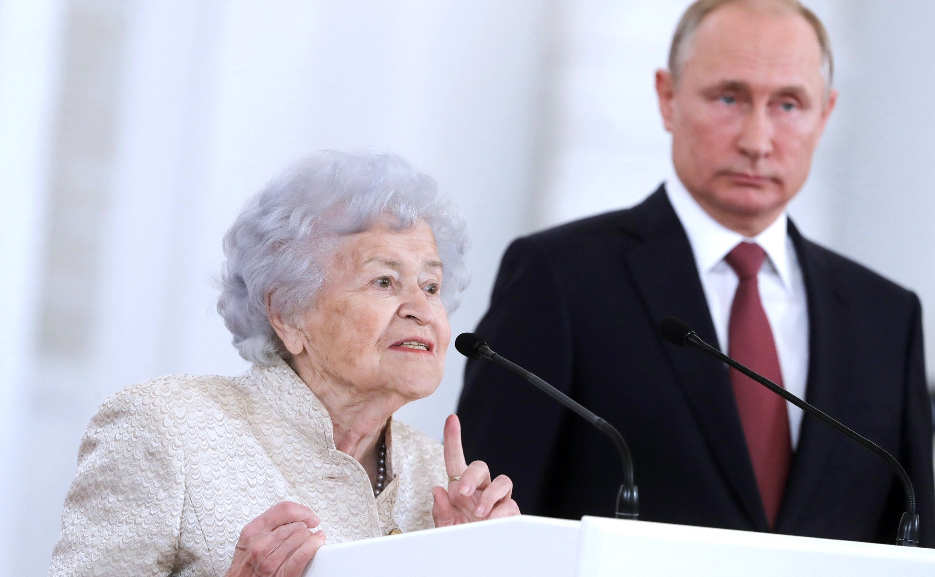 Церемония вручения государственных наград.